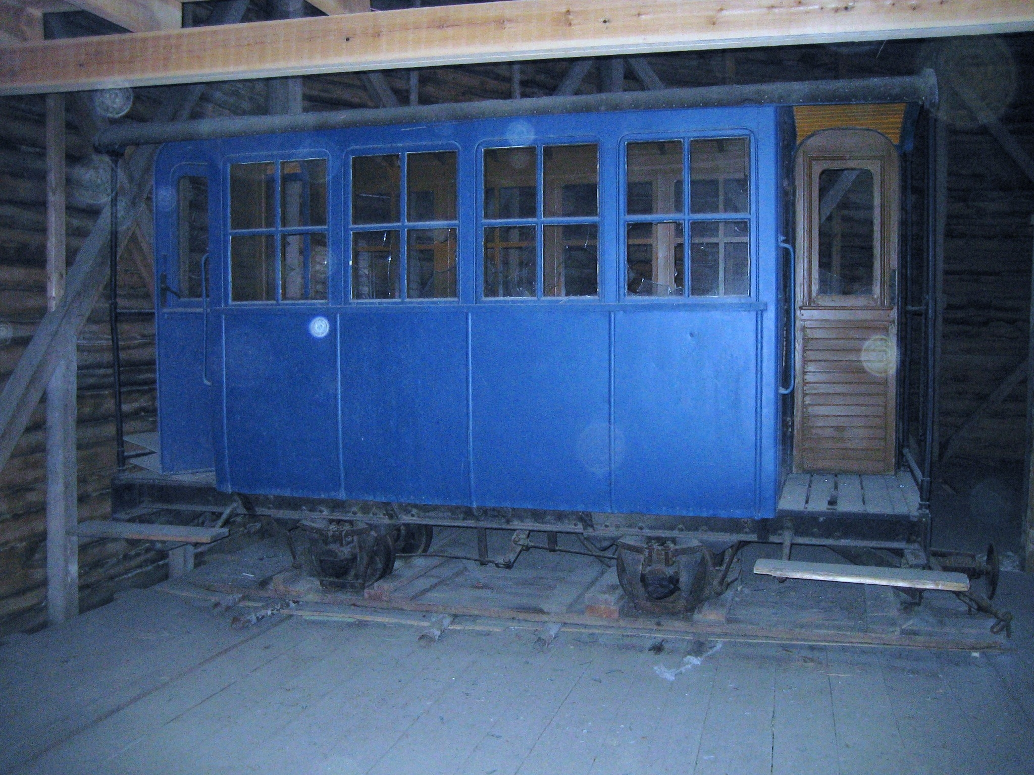 Lauritsalan tehtaan ja Lappeenrannan aseman välillä liikennöineen O/Y Kaukas A/B:n tehdasradan matkustajavaunu. (oli: Uudenkaarlepyyn-Kovjoen rautatien pienin matkustajavaunu varastossa Imatralla.)